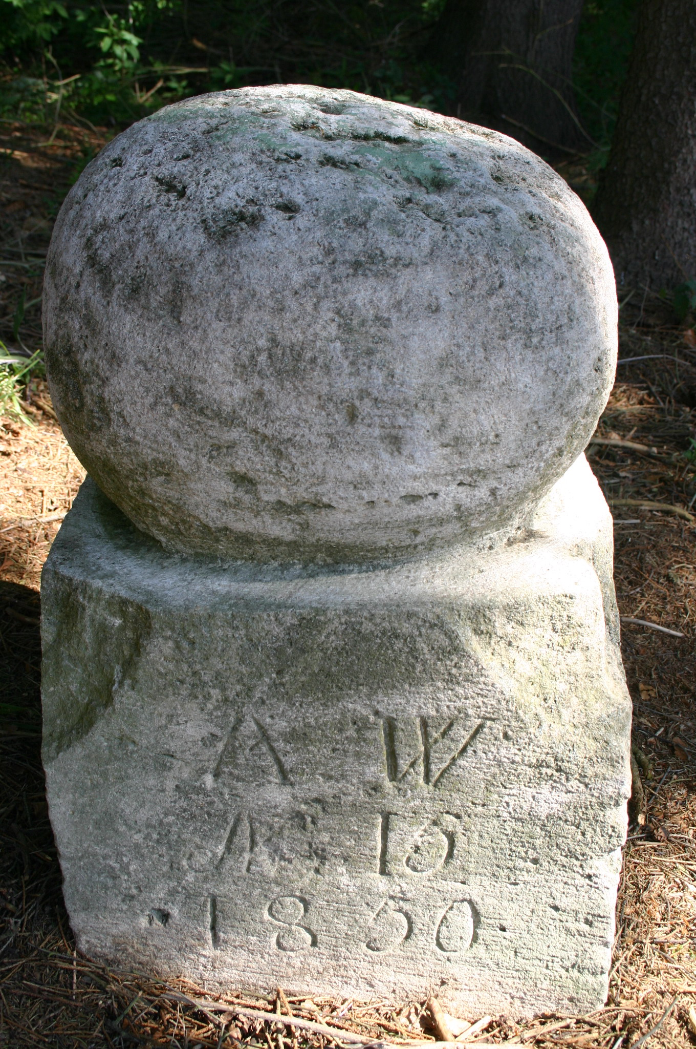 Kopfstein oder Vier Ämter Stein des Königreichs Hannover Grenzstein